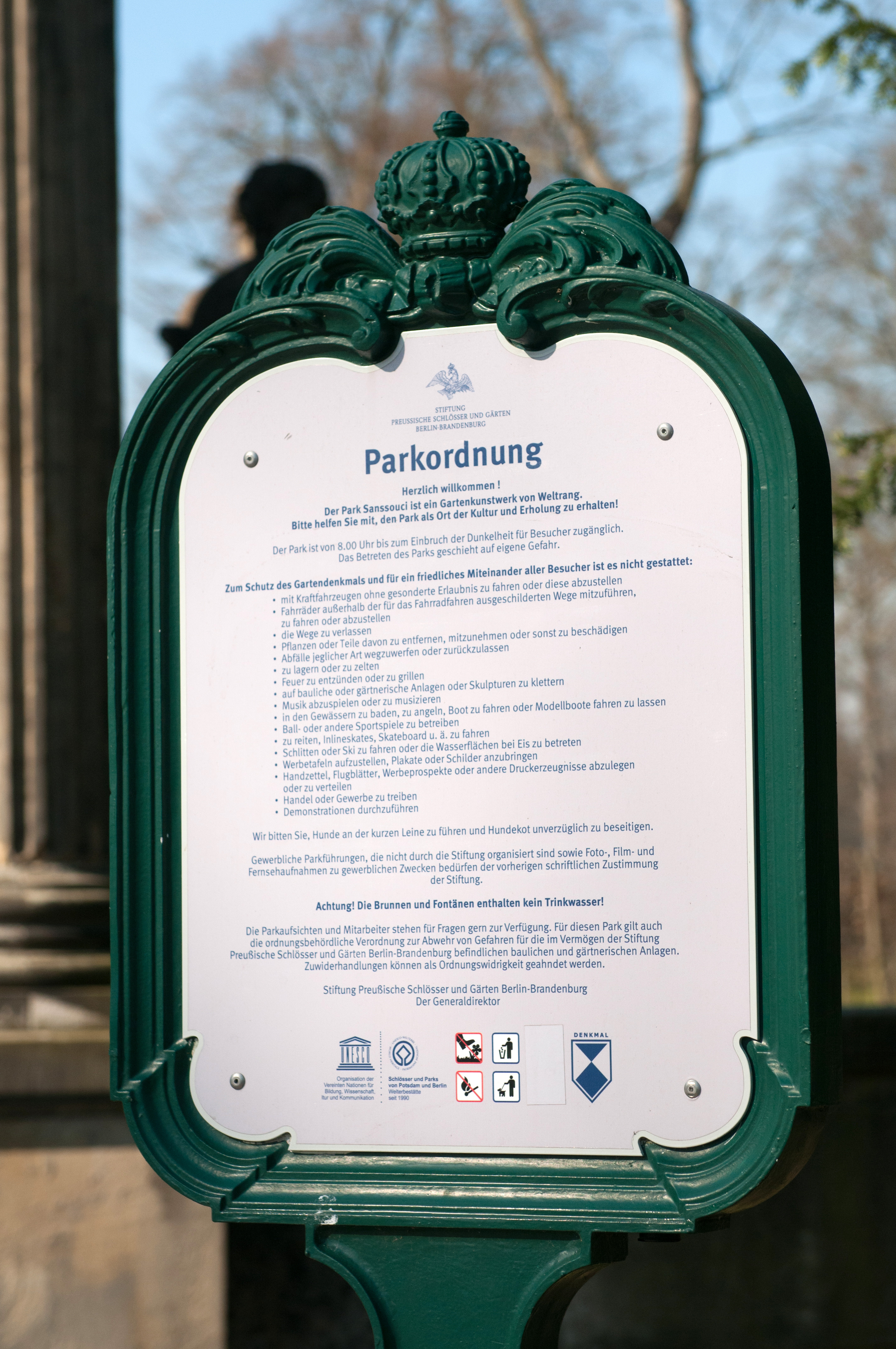 Garten und Schloss Sanssouci V ZR 14/12